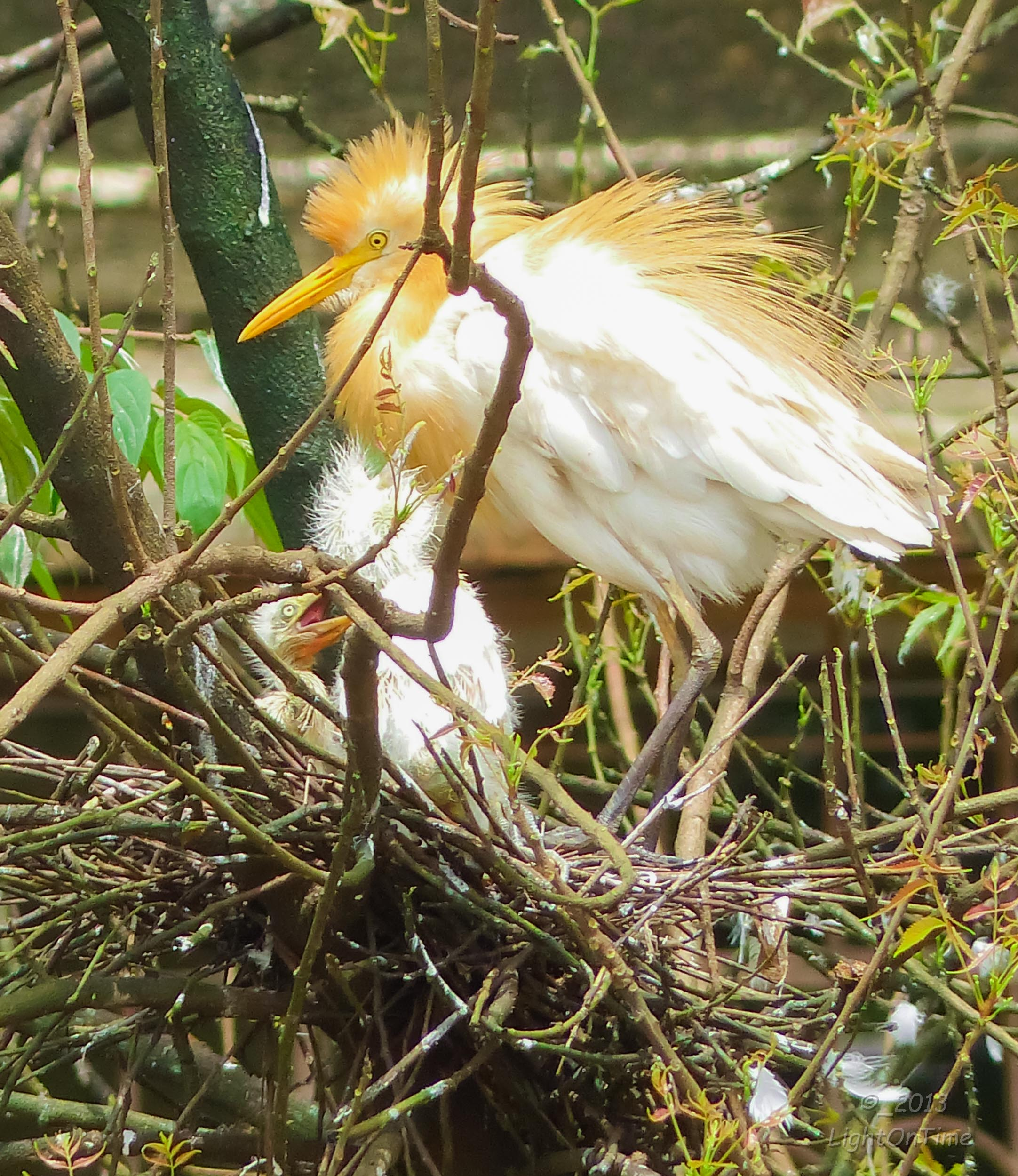 Ganeshpuri, Maharashtra 401206, India